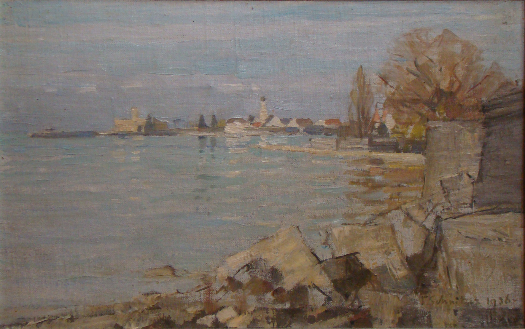 Theodor Schnitzer (1866-1939): Blick auf Langenargen